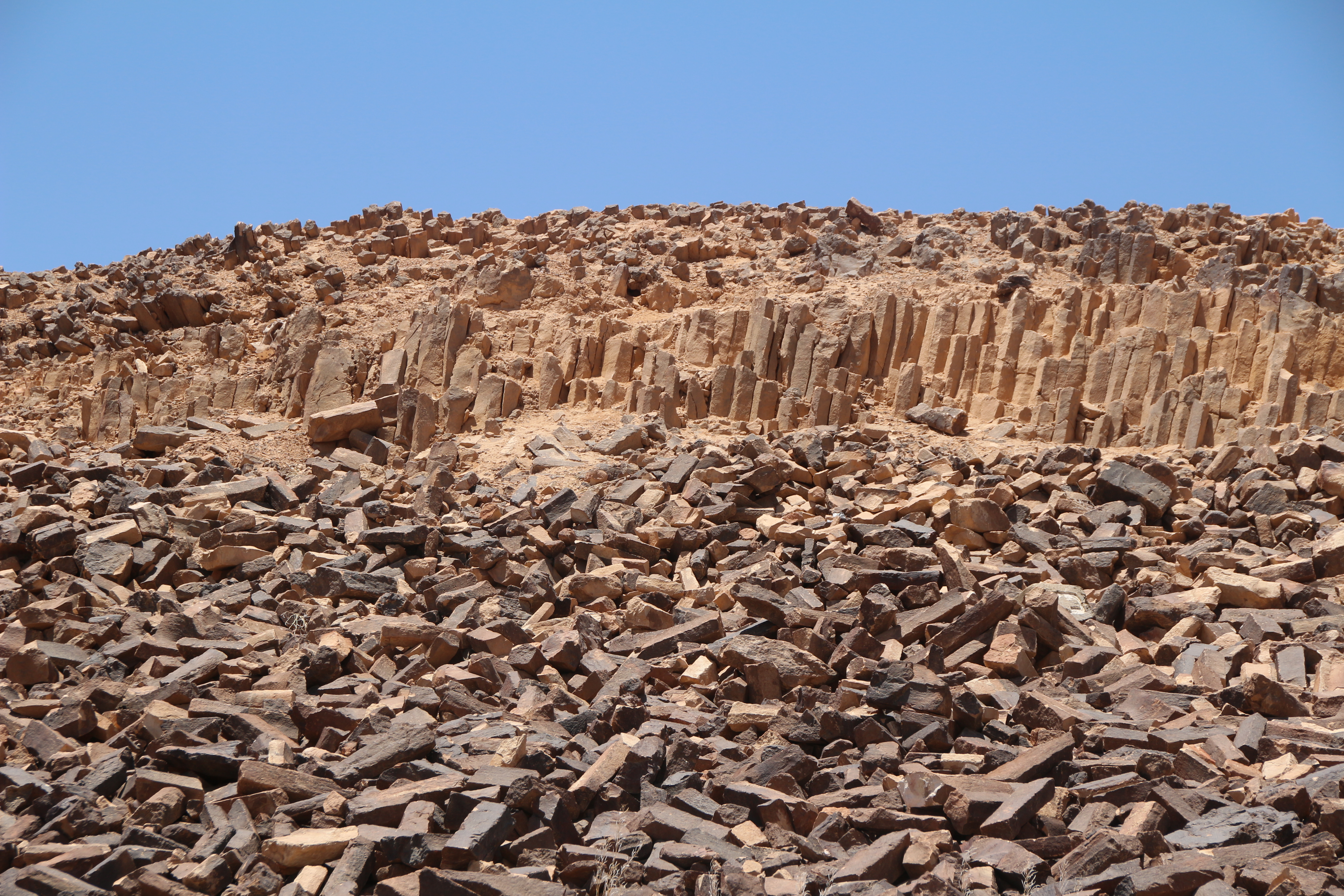 מכתש רמון הוא המכתש האירוזי הגדול בעולם. הוא מצוי בישראל ומהווה אחד מחמשת המכתשים שבנגב. נופו של מכתש רמון הוא ייחודי. על קצה המכתש מצויה העיירה מצפה רמון.